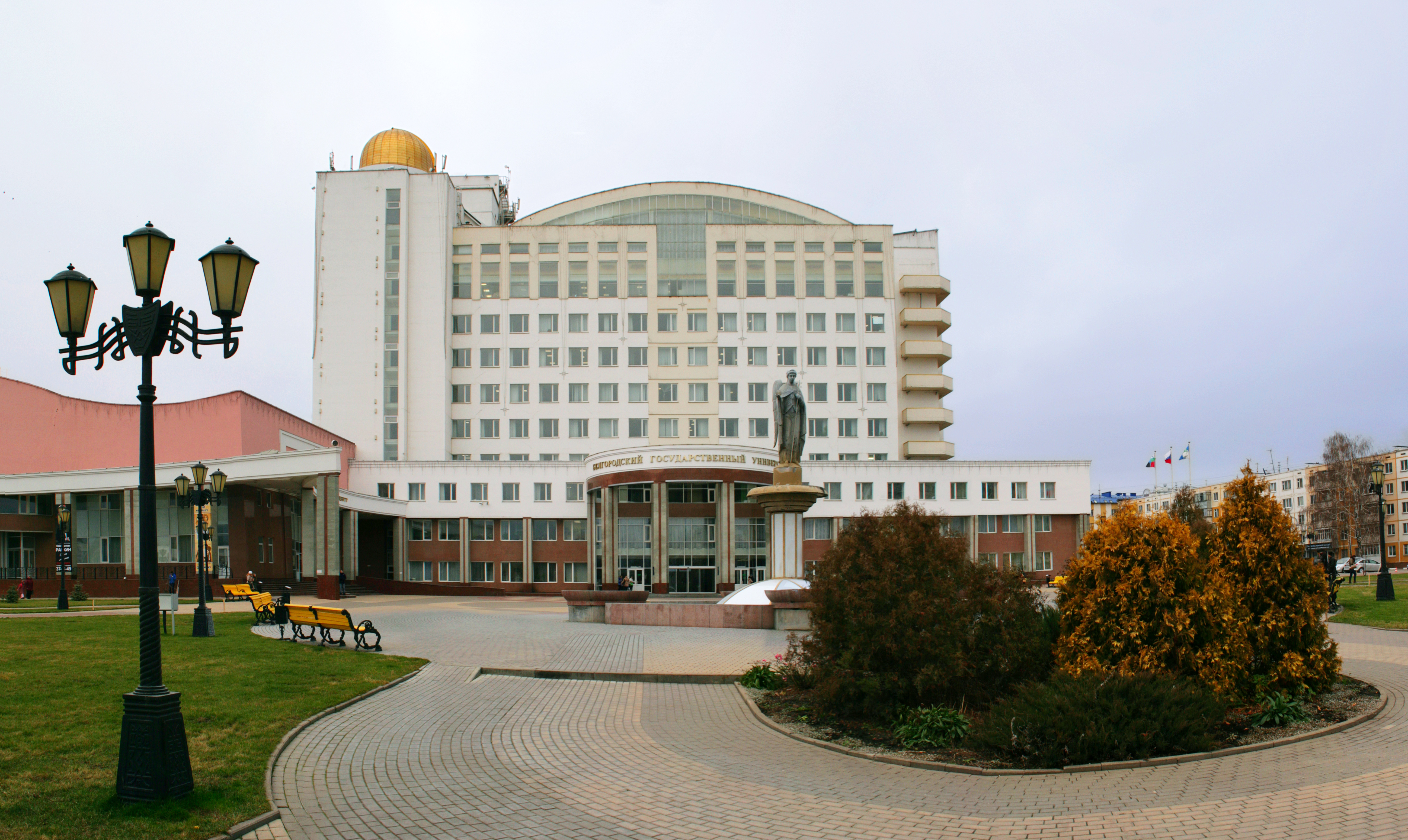 Белгородский государственный университет.